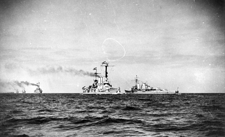 Kriegsschiffe der Reichsmarine in Kiellinie Kriegsschiffe der Reichsmarine in Kiellinie bei einer Flottenparade. - Linienschiffe, rechts Leichter Kreuzer der Königsberg-Klasse (Leichter Kreuzer Karlsruhe / Leichter Kreuzer Köln / Leichter Kreuzer Königsberg) Information added by Wikimedia users.Kriegsschiffe der Reichsmarine der Weimarer Republik bei einer Flottenparade 1929. Rechts im Bild ein Leichter Kreuzer der K-Klasse, vermutlich Königsberg. In der Bildmitte sind zwei Linienschiffe der Deutschland-Klasse zu sehen, vermutlich entweder Hannover oder Schleswig-Holstein.